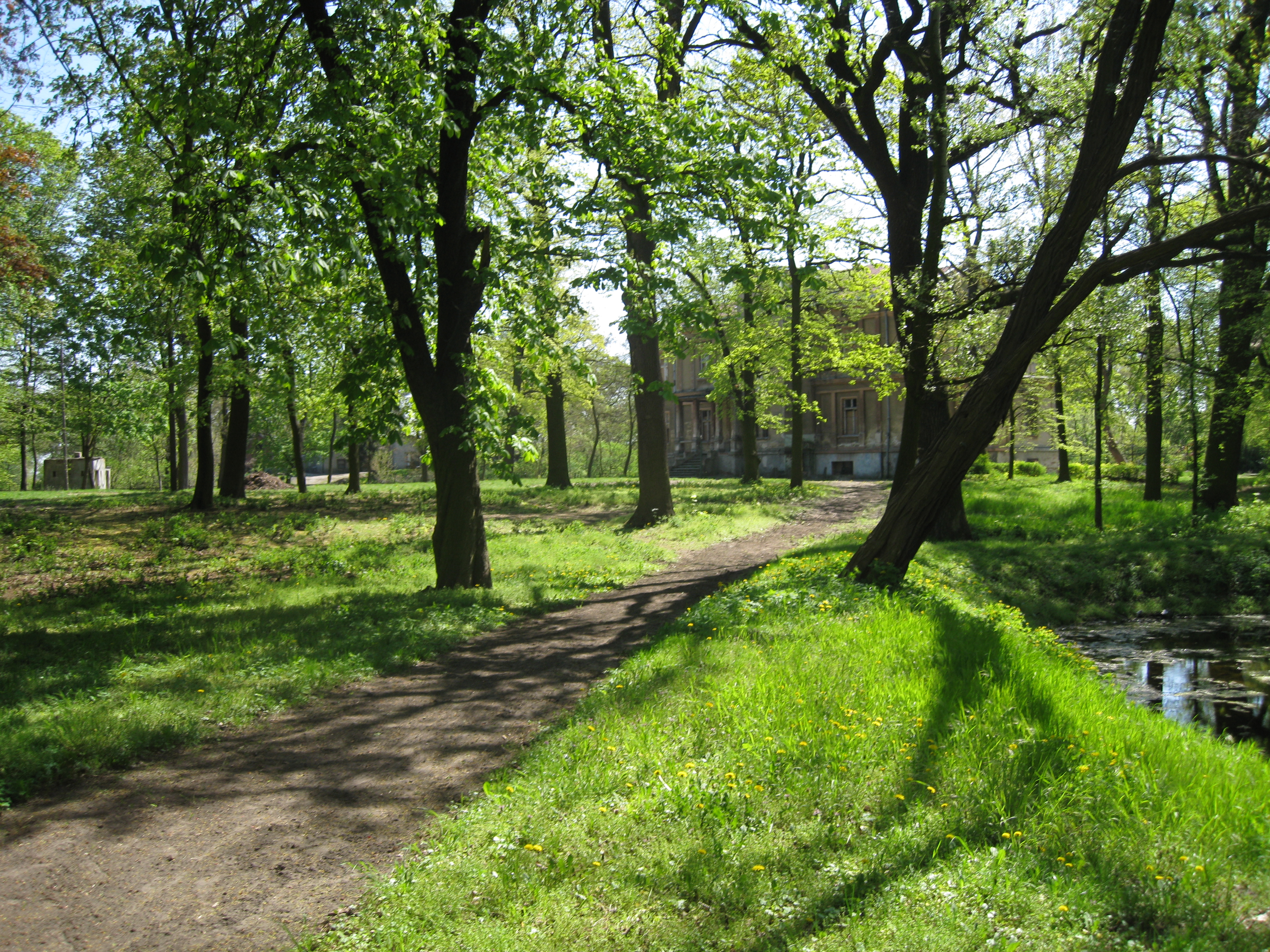 Park przy Dworze w Sarnowie